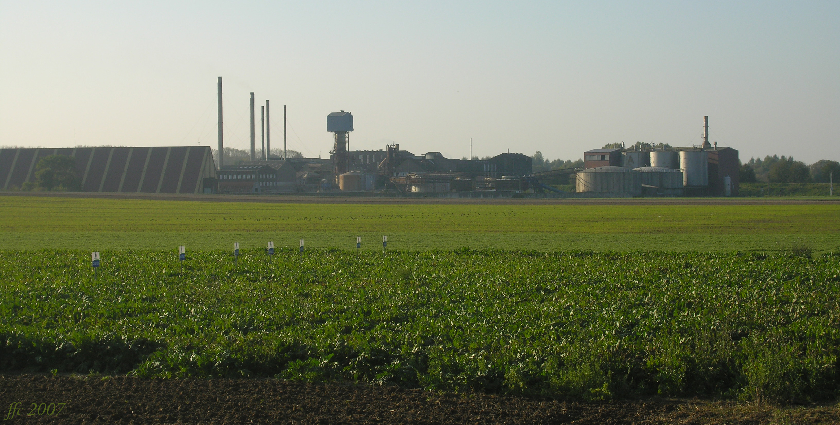 Hollogne-sur-Geer (Belgium) Test field for sugar beets and sugar factory Champ d'essay de betteraves à sucre et sucrerie dans le fond Camp d'assaig de remolatxes ifàbrica de sucre Testveld voor suikerbieten met suikerrafinaderij op de achtergrond